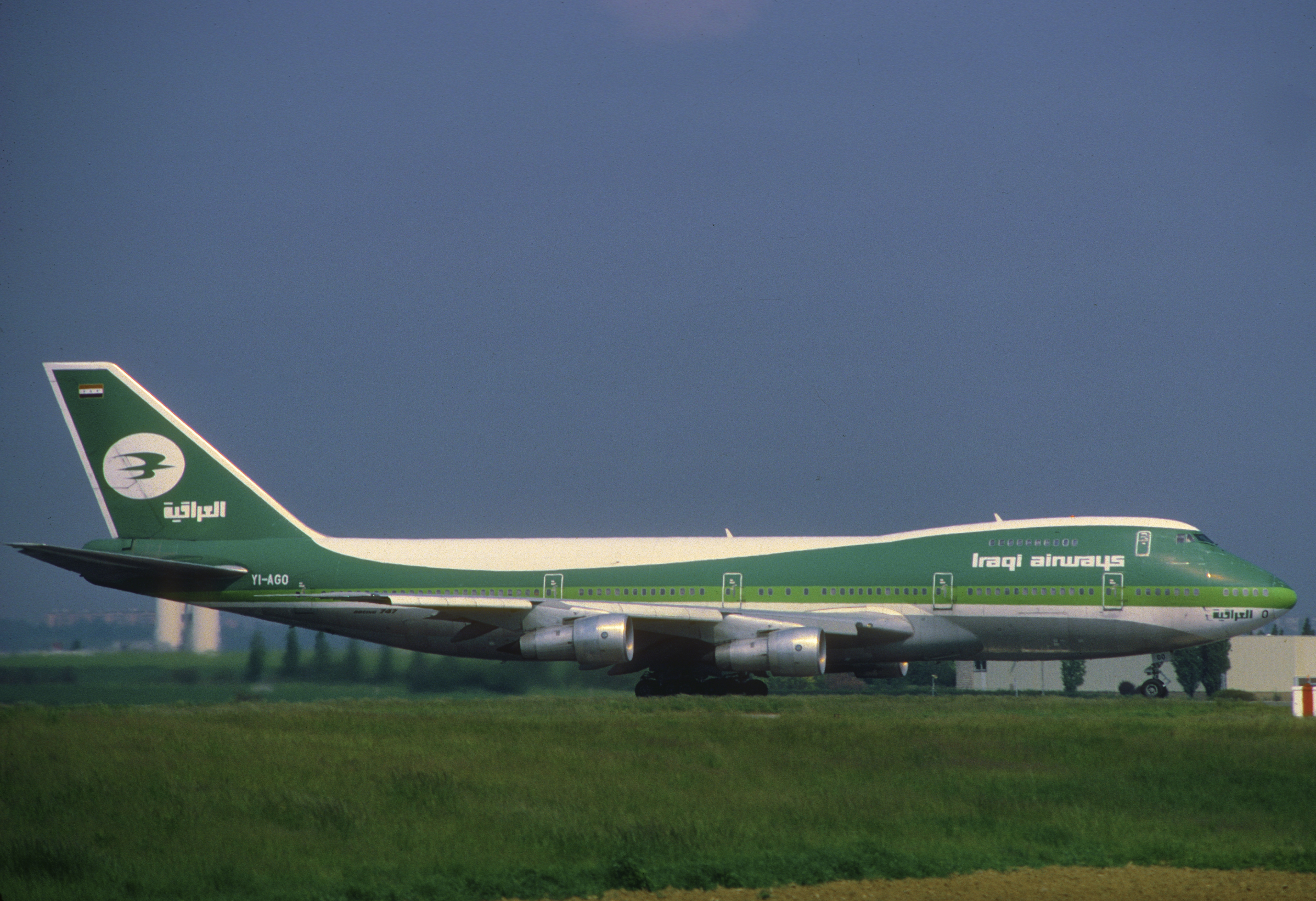 Iraqi Airways Boeing 747-270C; YI-AGO@ORY, May 1987/ ASK